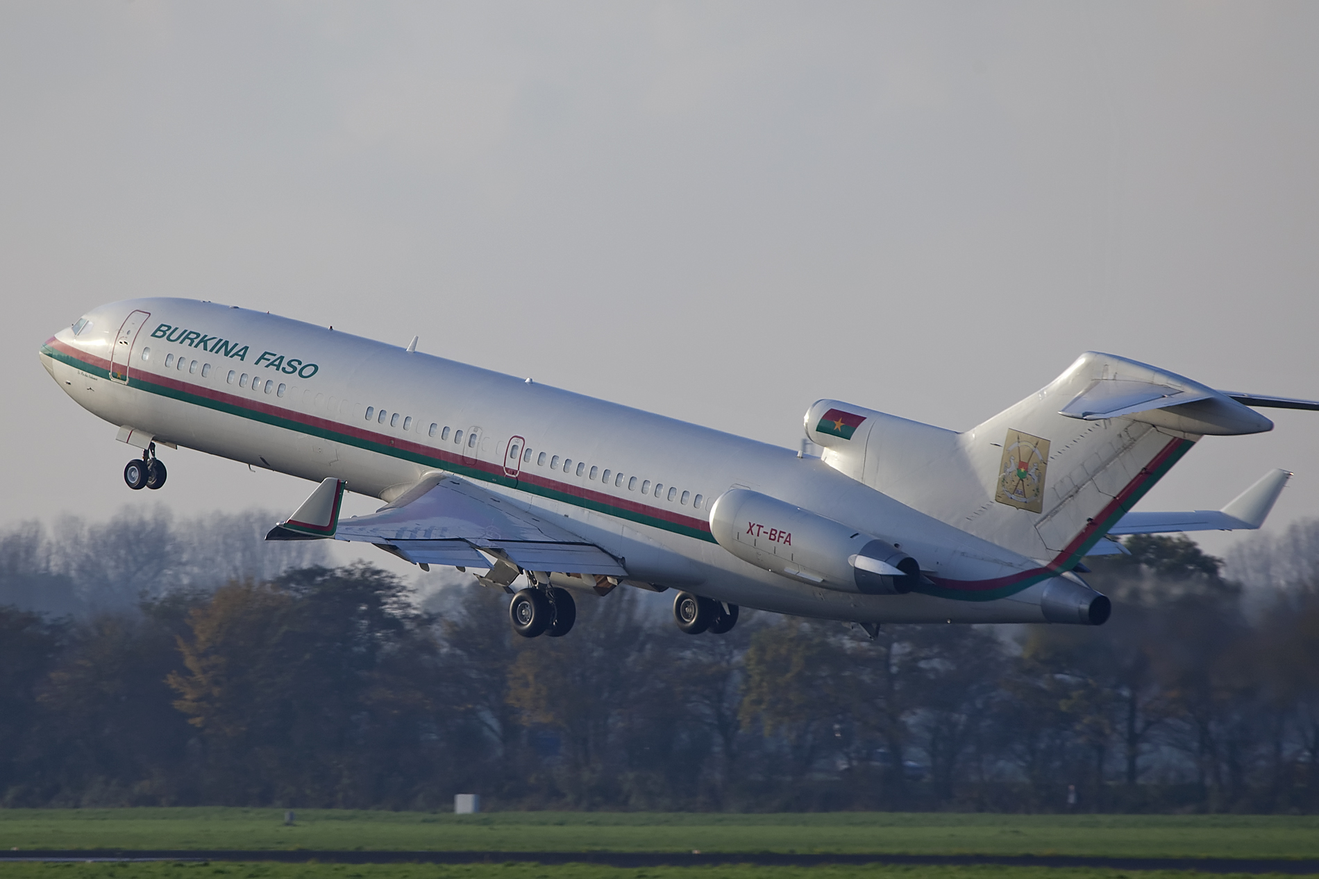 Rotterdam